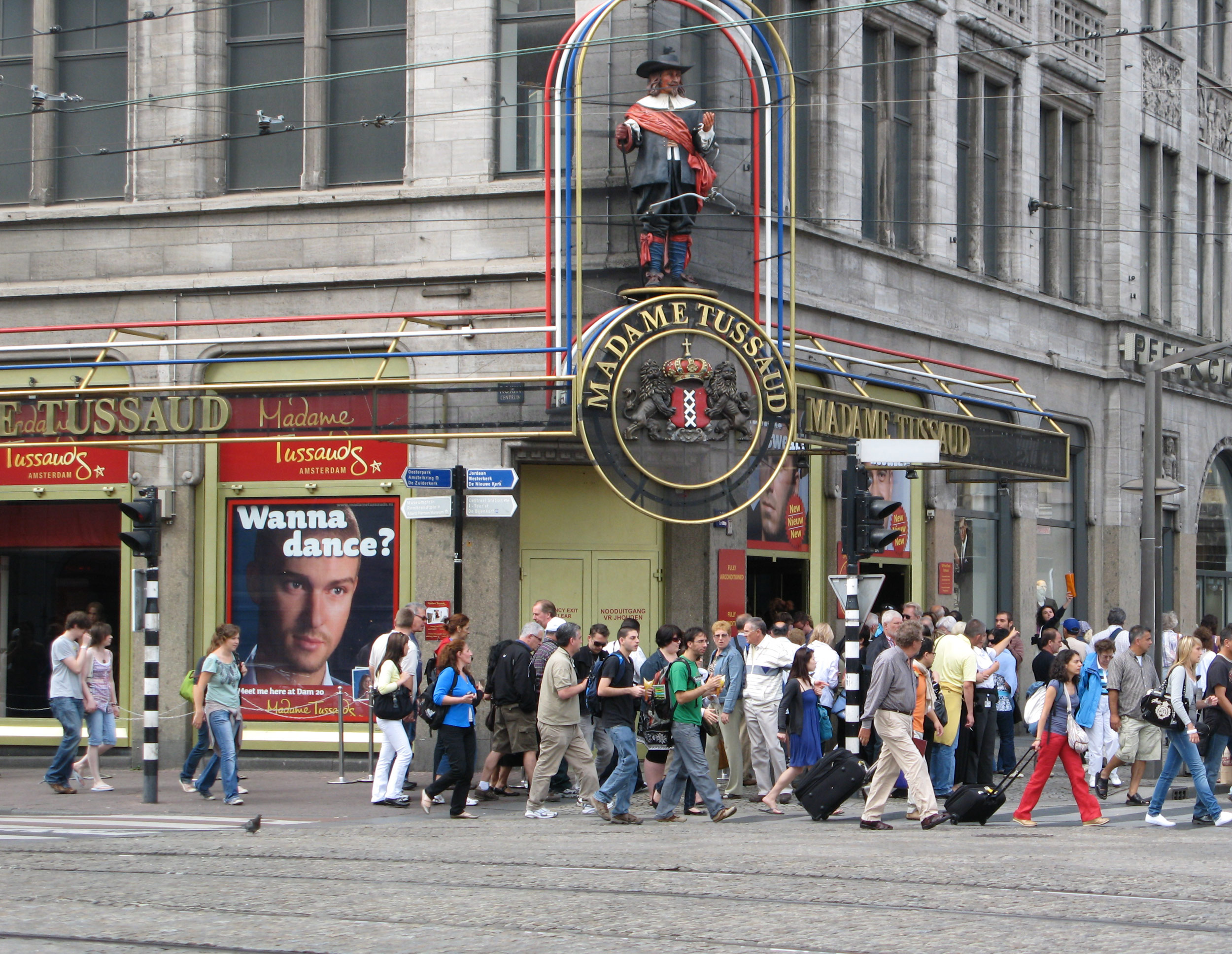 Музей мадам Тюссо (Madame Tussauds) — музей восковых фигур в Амстердаме